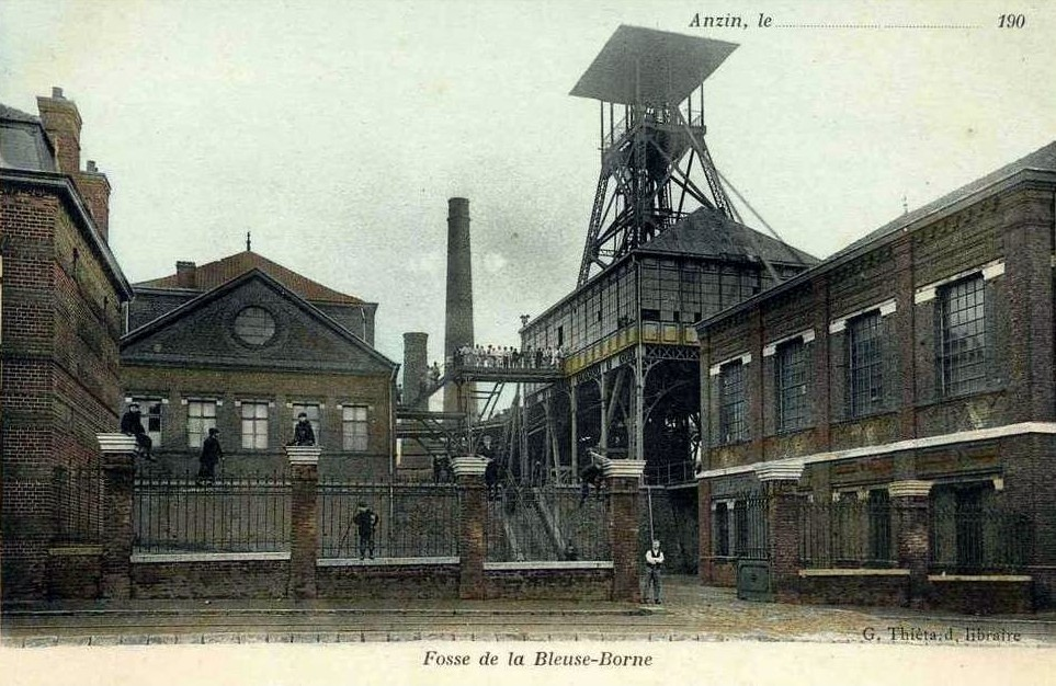 Ancienne Fosse aujourd'hui disparue